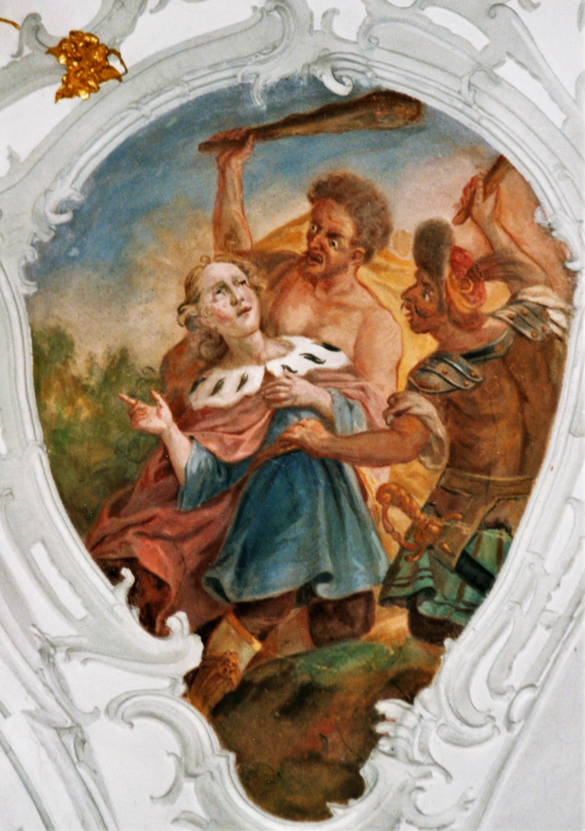 St. Vitus (Balzhausen), Fresko (1768): Martyrium des heiligen Vitus